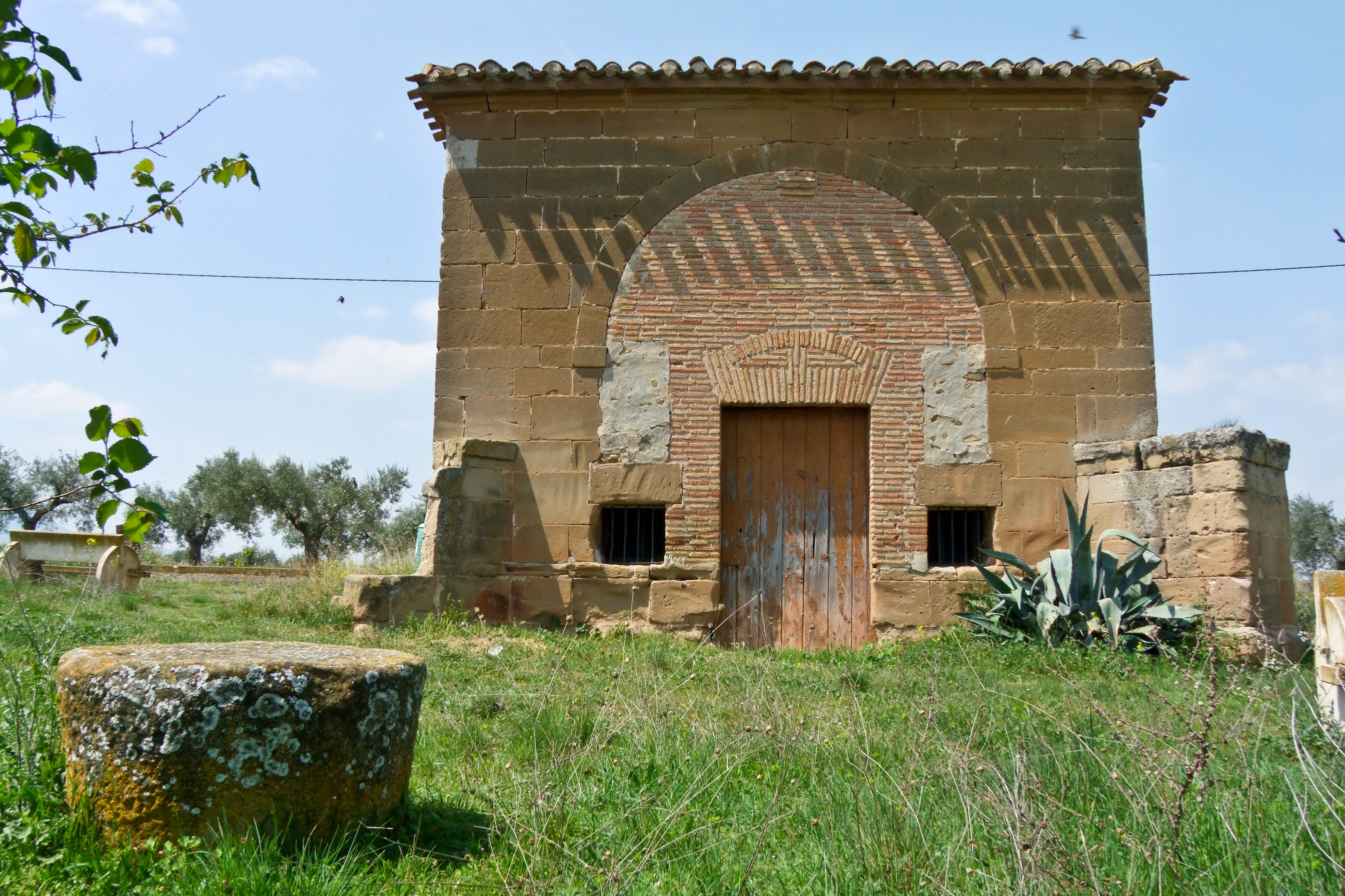 Ermita de Santa Ana en la localidad de Murillo de Río Leza, La Rioja - España